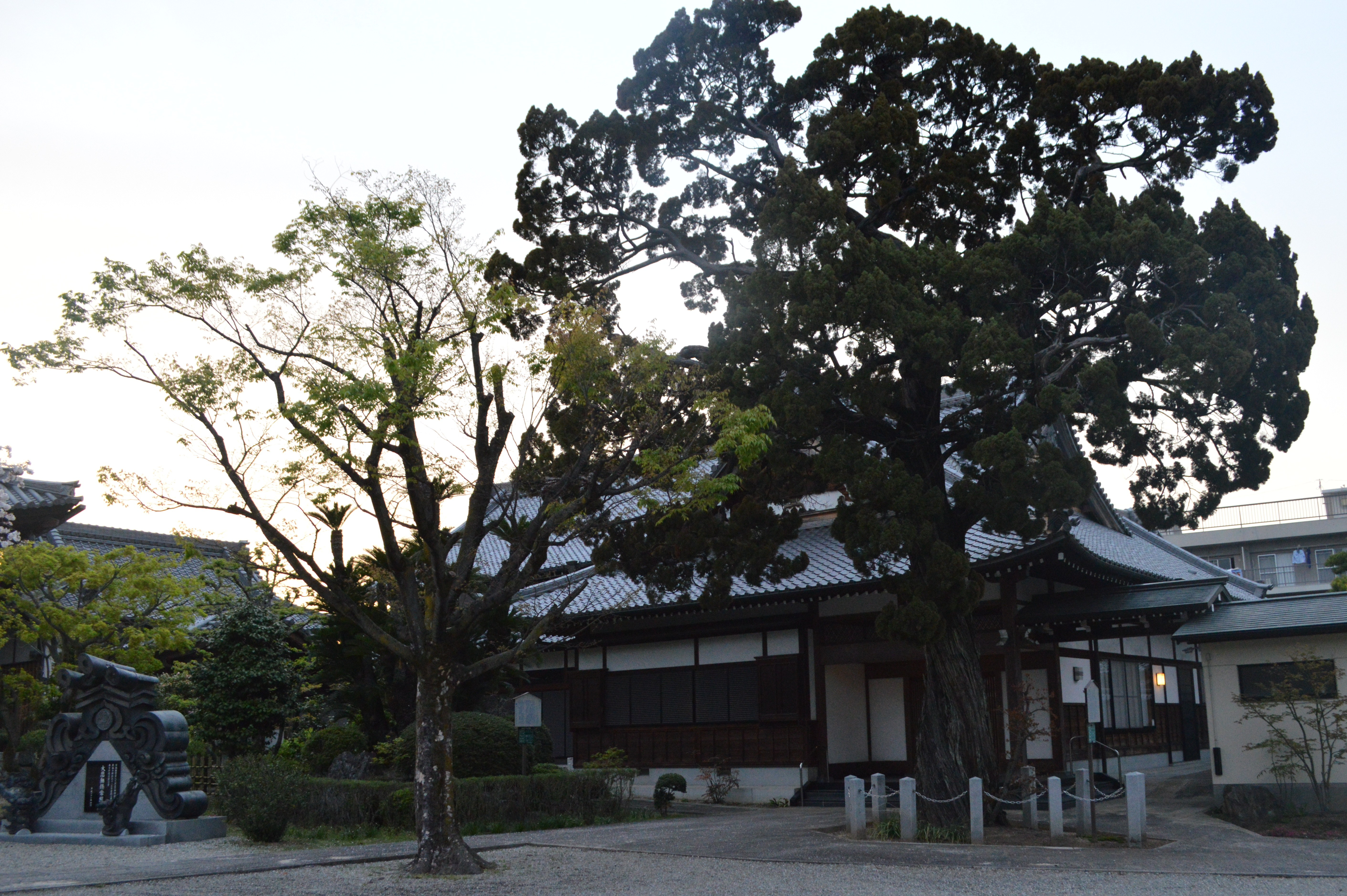 愛知県知立市 万福寺（萬福寺） 右は愛知県指定天然記念物の「万福寺のイブキ」